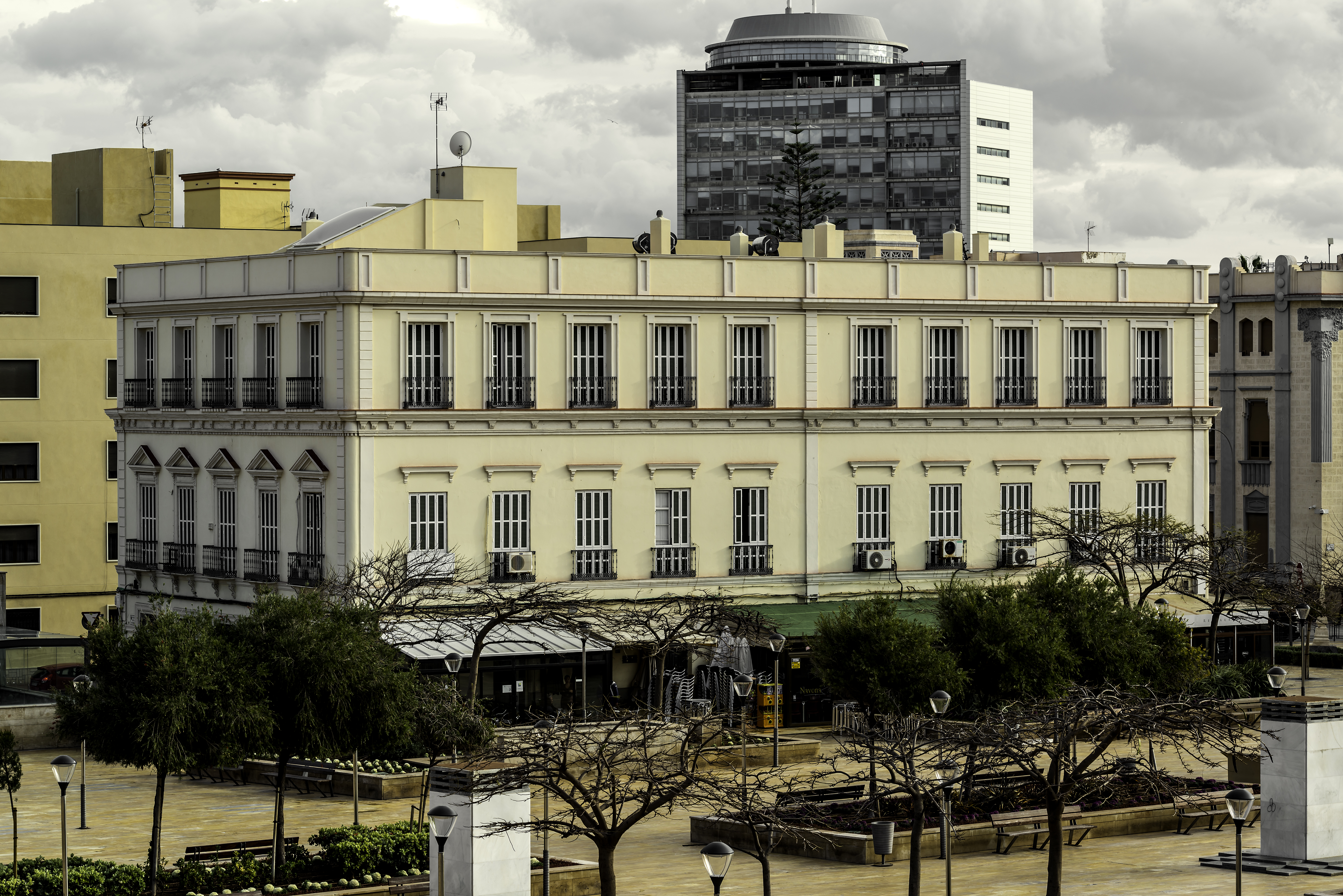 La Casa Salama es un edificio de estilo clasicista, situado en la Plaza Yamín Benarroch, Calle Duque de Almodóvar y la Plaza de las Culturas. Forma parte del Conjunto Histórico Artístico de la Ciudad de Melilla.